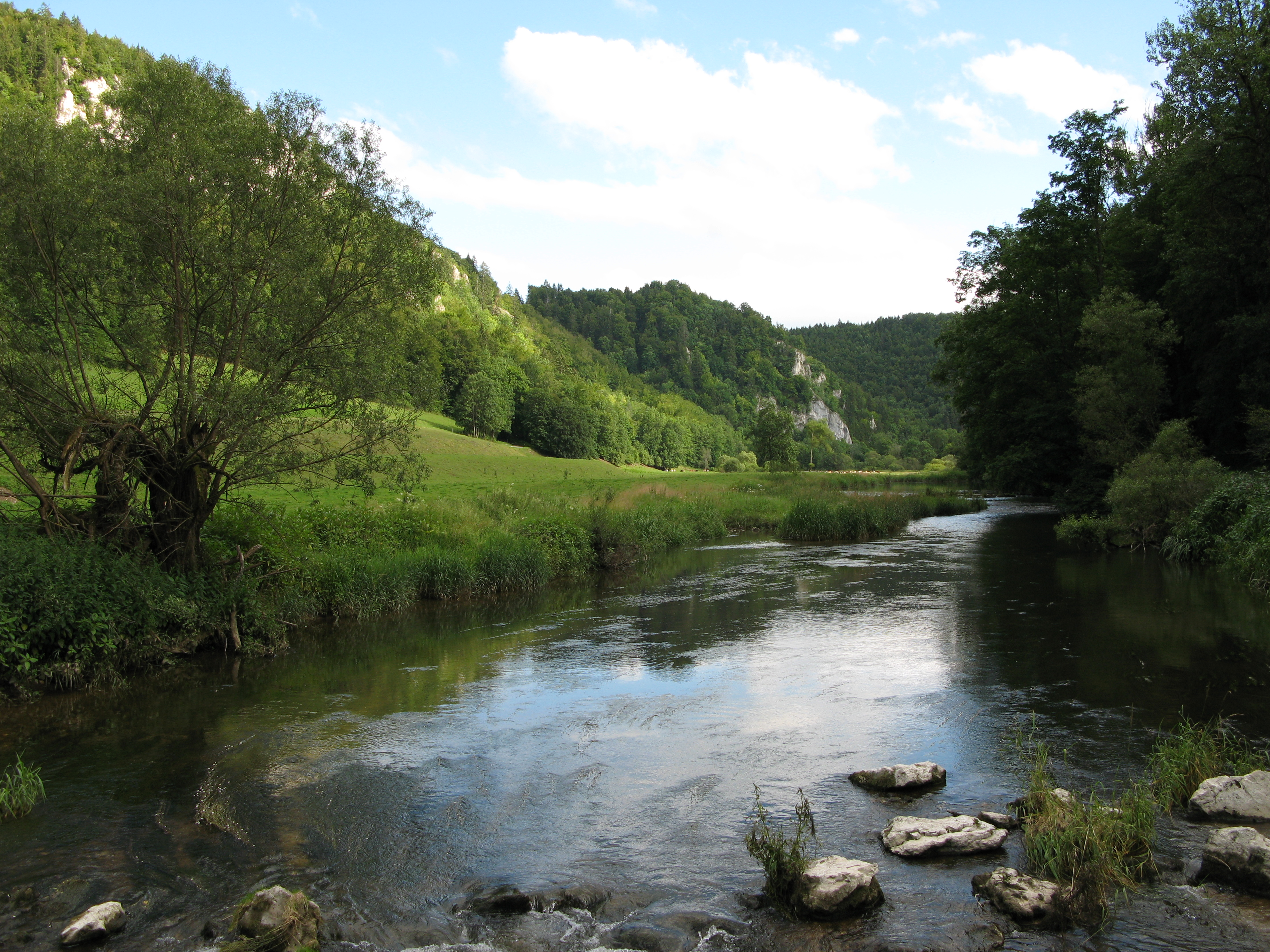 Die Donau im Donaudurchbruch am Jägerhaus unterhalb Schloss Bronnen am Donauberglandweg auf der Schwäbischen Alb.